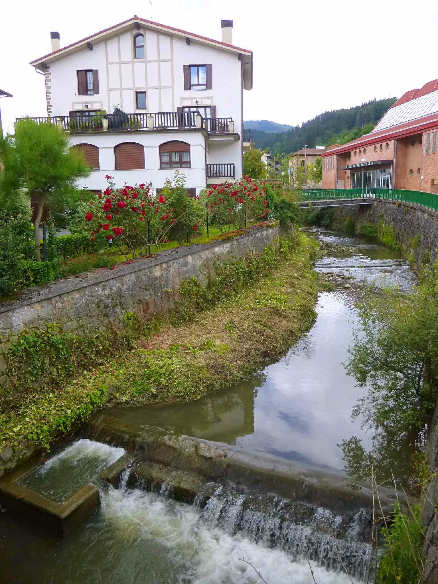 Idiazabal (Gipuzkoa)